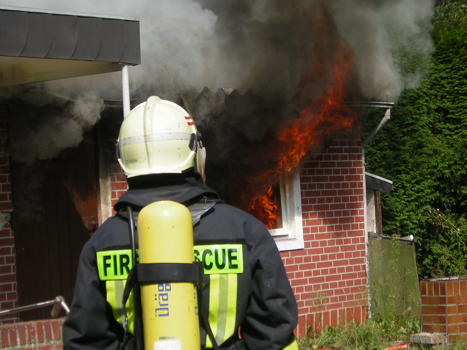 Darstellung eines Zimmerbrandes beim Einsatztraining 2004 der Feuerwehr Jüchen